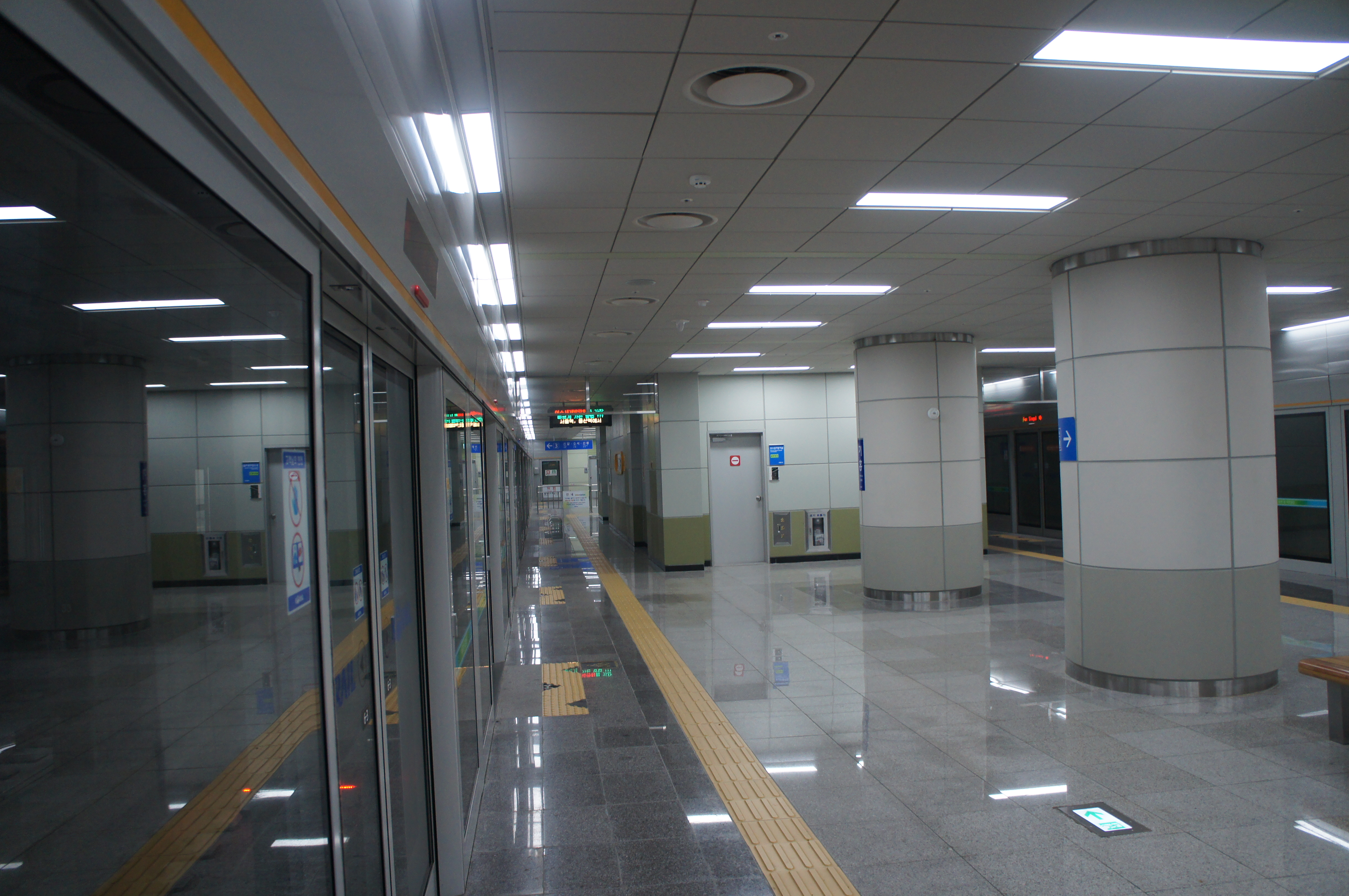 기흥역 3번 승강장